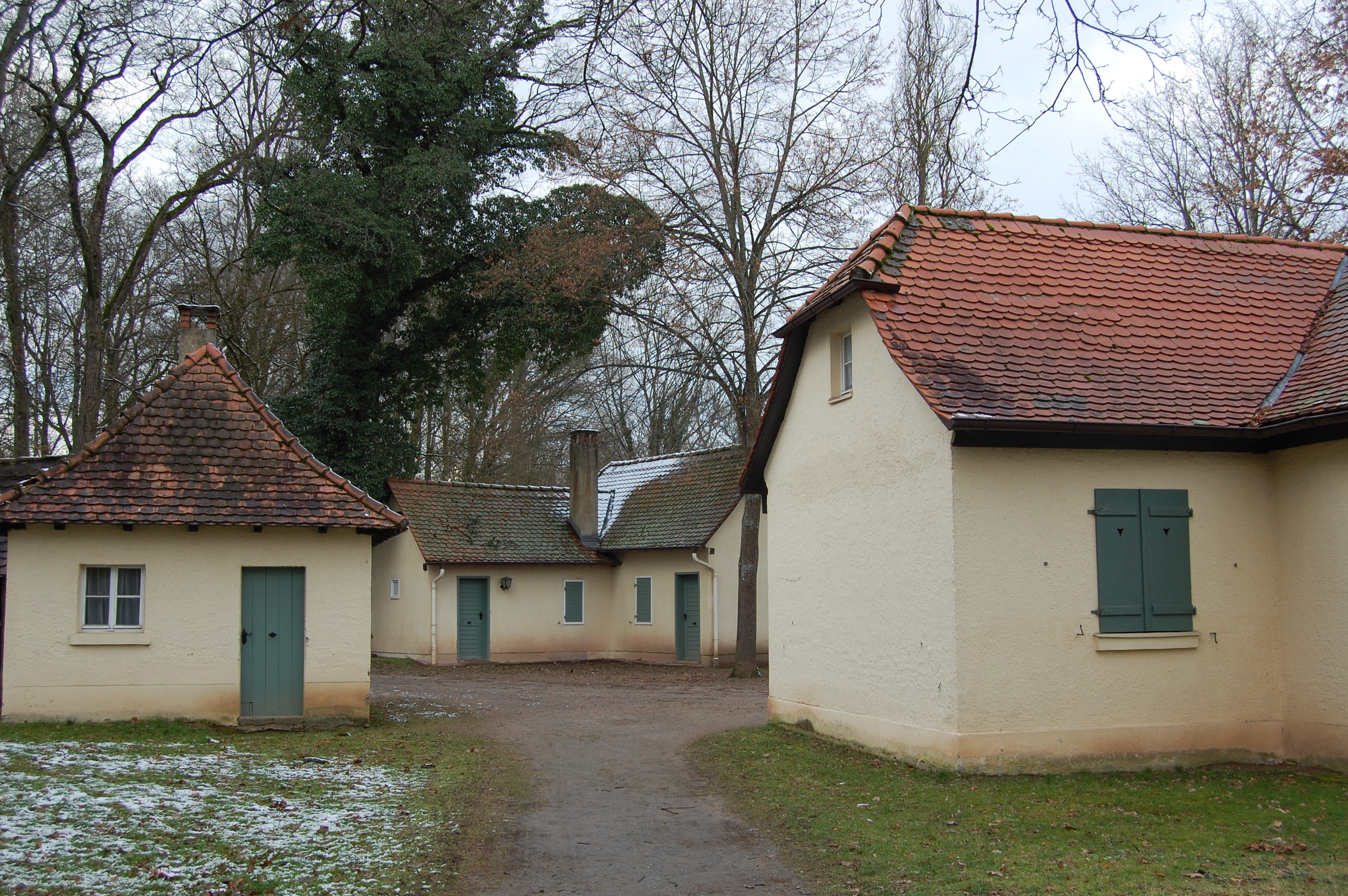 Widok tzw. wioseczki